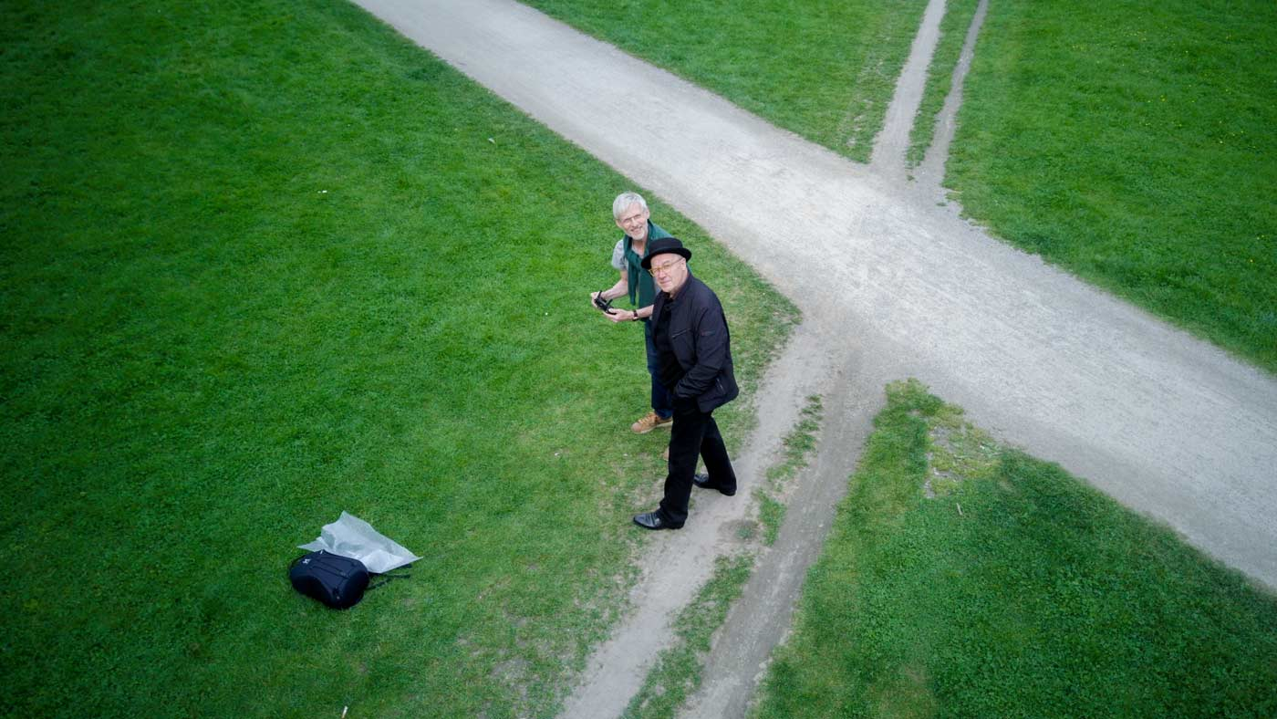 Der Hörspielregisseur und Schriftsteller Walter Adler, mit einem Freund und Kollegen, 2017.